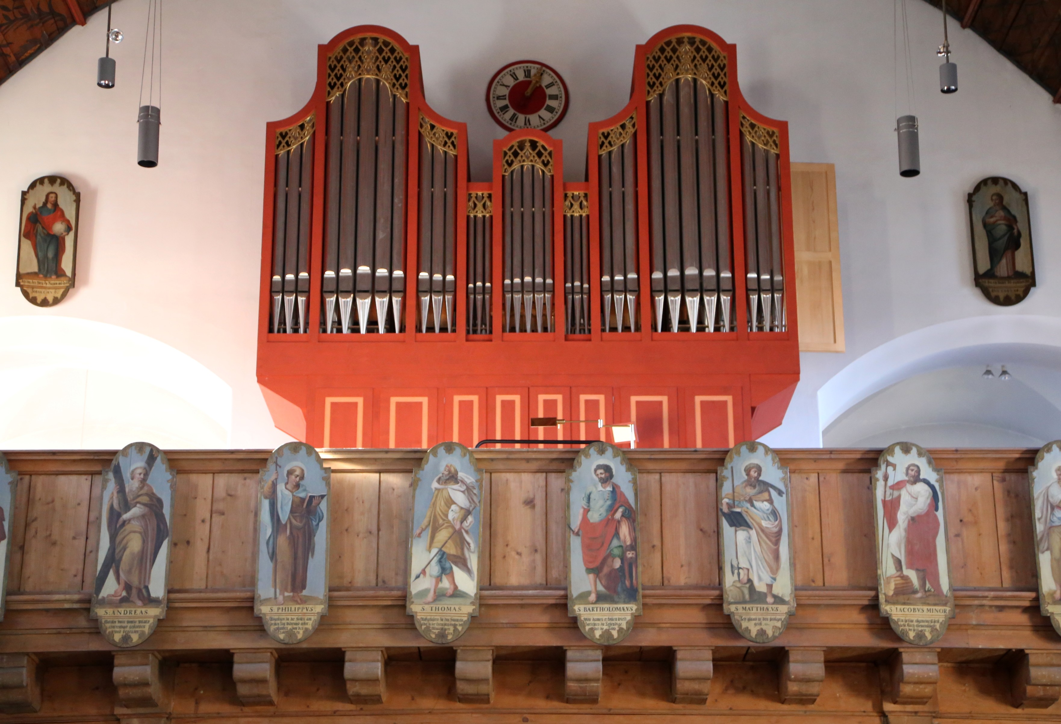 Fallstraße 7; Kath. Pfarrkirche St. Achaz, in Anlehnung an den barocken Vorgängerbau 1927–28 von Richard Steidle; mit Ausstattung, München